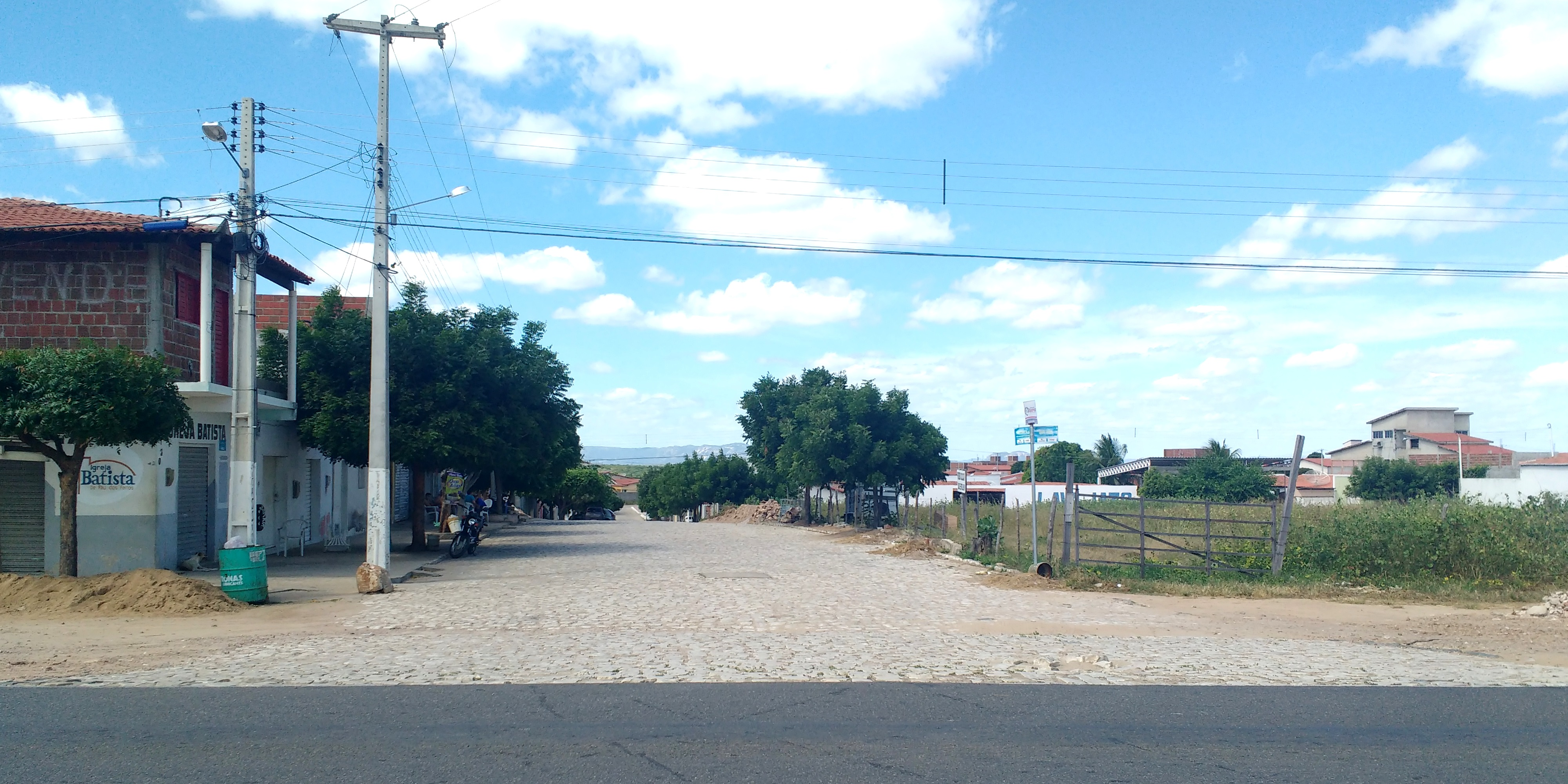 Rua Antonieta Germano, na entrada do bairro Chico Cajá em Pau dos Ferros, Rio Grande do Norte (Brasil).